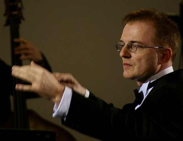 ヤンポガニー